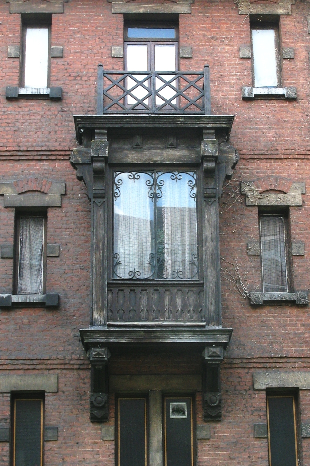 En Erker aus Holz op enger aler Villa zu Léck beim Jardin botanique, an der Rue Louvrex.